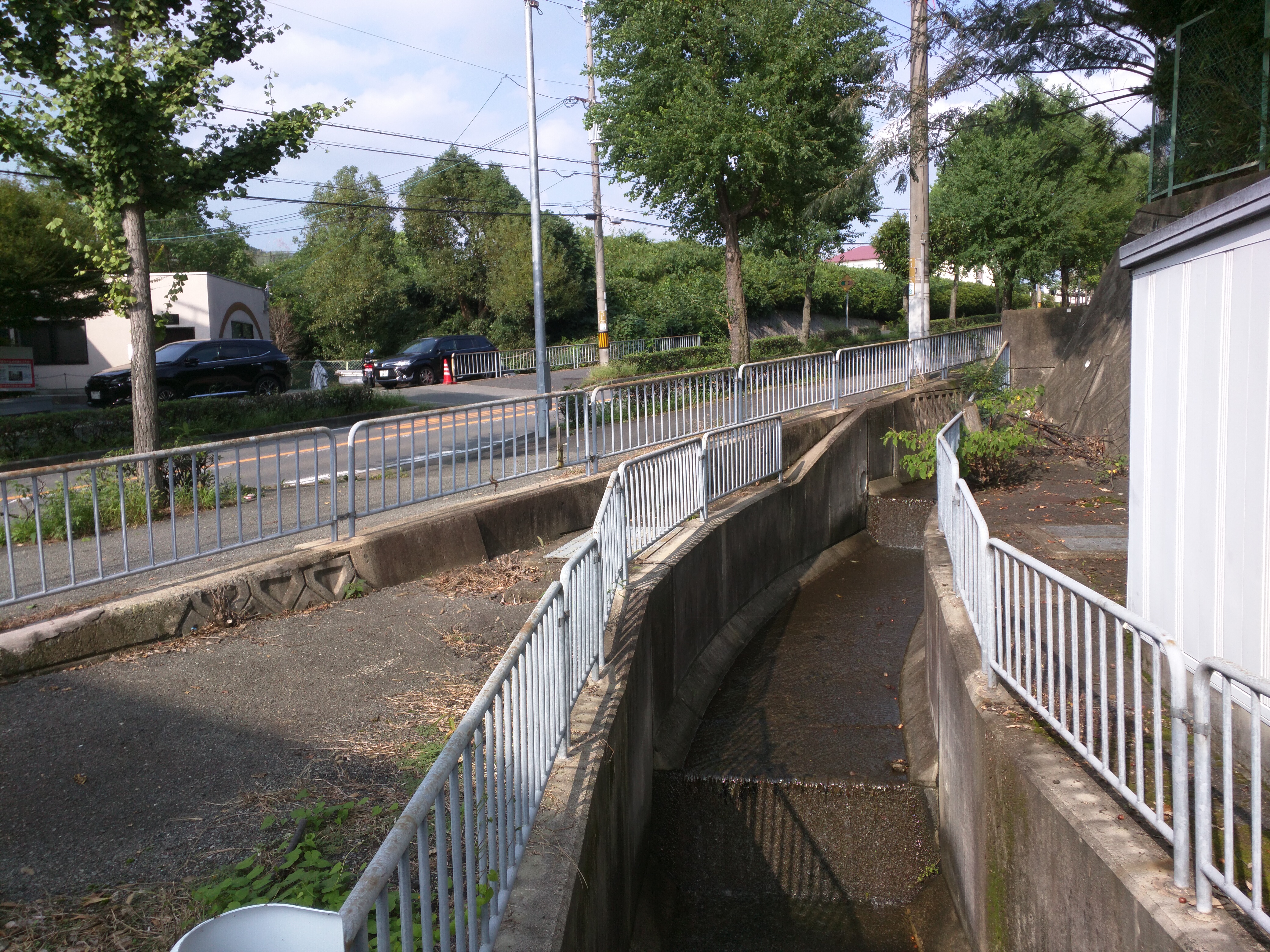 Wikipedia:芋川（大阪府）打越池付近